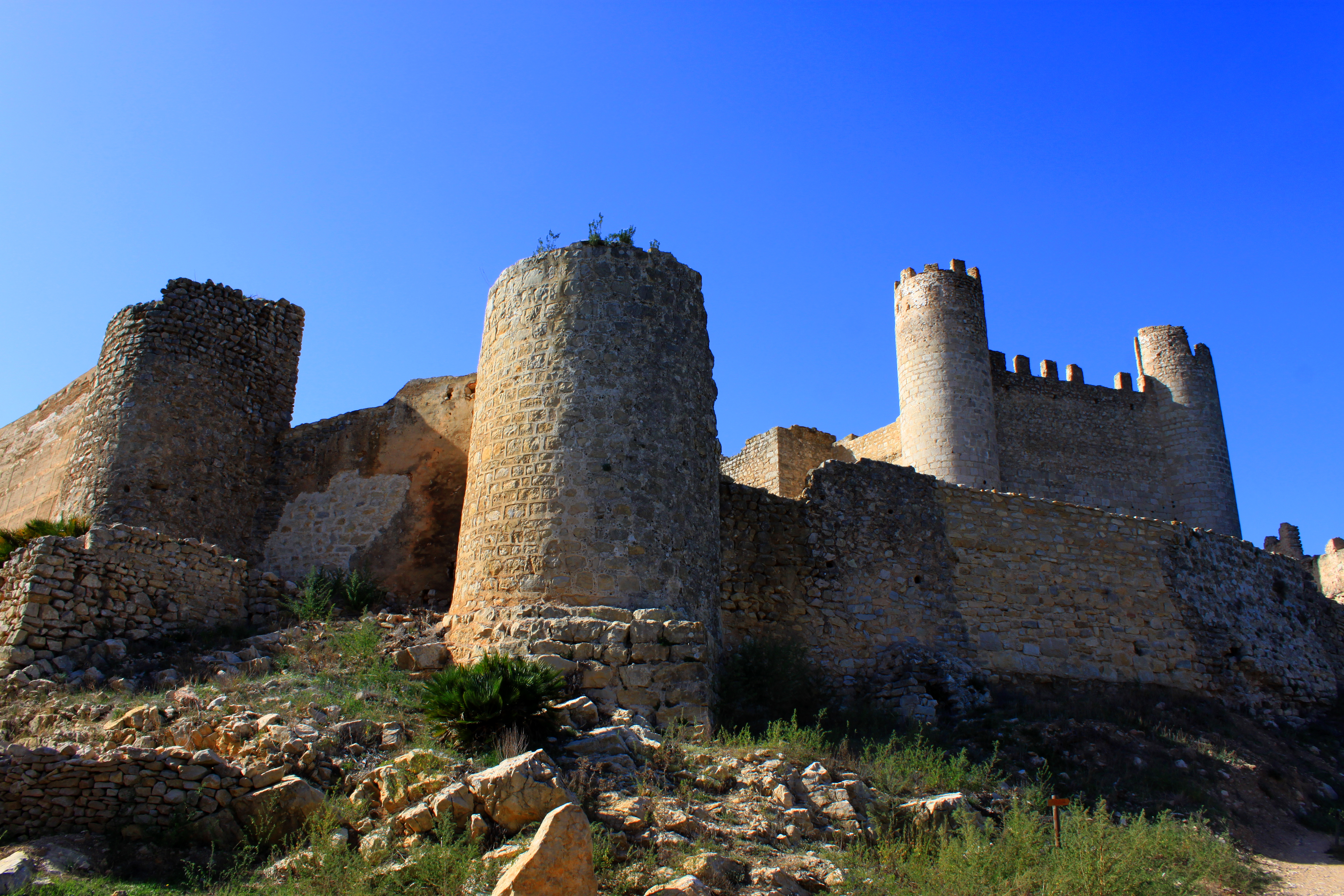 Castillo de Xivert. Vista externa de la muralla del albacar con dos torreones semicirculares correspondientes al tramo oriental. Al fondo se observa la alcazaba con sus dos grandes torres circulares de sillería construidas por la Orden del Temple. Alcalá de Xivert, provincia de Castellón, Comunidad Valenciana, España.